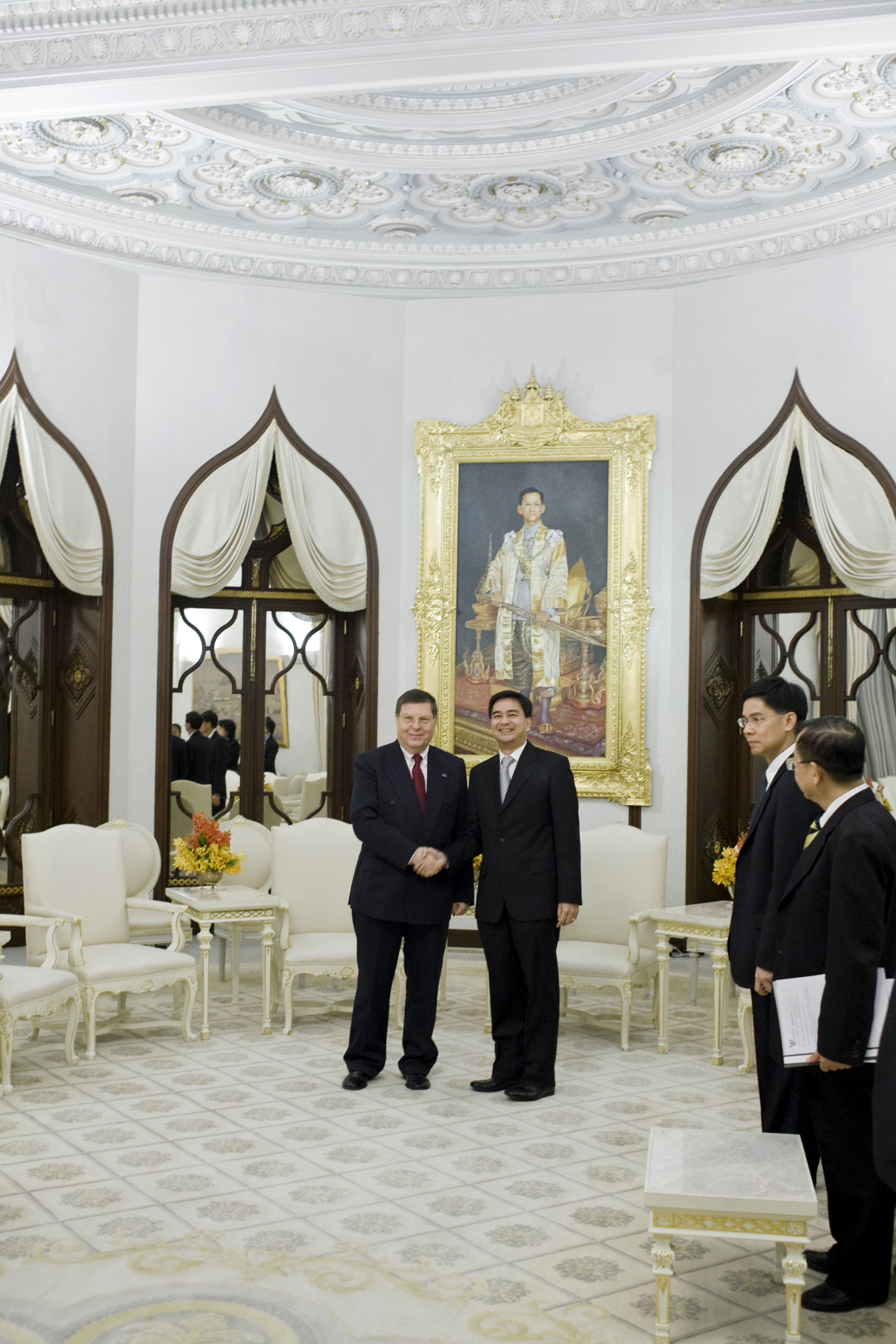 H.E.Mr. Yevgeny Vladimirovich Afanasiev เอกอัครราชทูตวิสามัญผู้มีอำนาจเต็มแห่งสหพันธรัฐรัสเซียประจำประเทศไทย เข้าเยี่ยมคารวะนายกรัฐมนตรี ในโอกาสเข้ารับหน้าที่ใหม่ ณ ห้องสีงาช้าง ตึกไทยคู่ฟ้า ทำเนียบรัฐบาล 5 กุมภาพันธ์ 2553 (The Official Site of The Prime Minister of Thailand Photo by พีรพัฒน์ วิมลรังครัตน์)